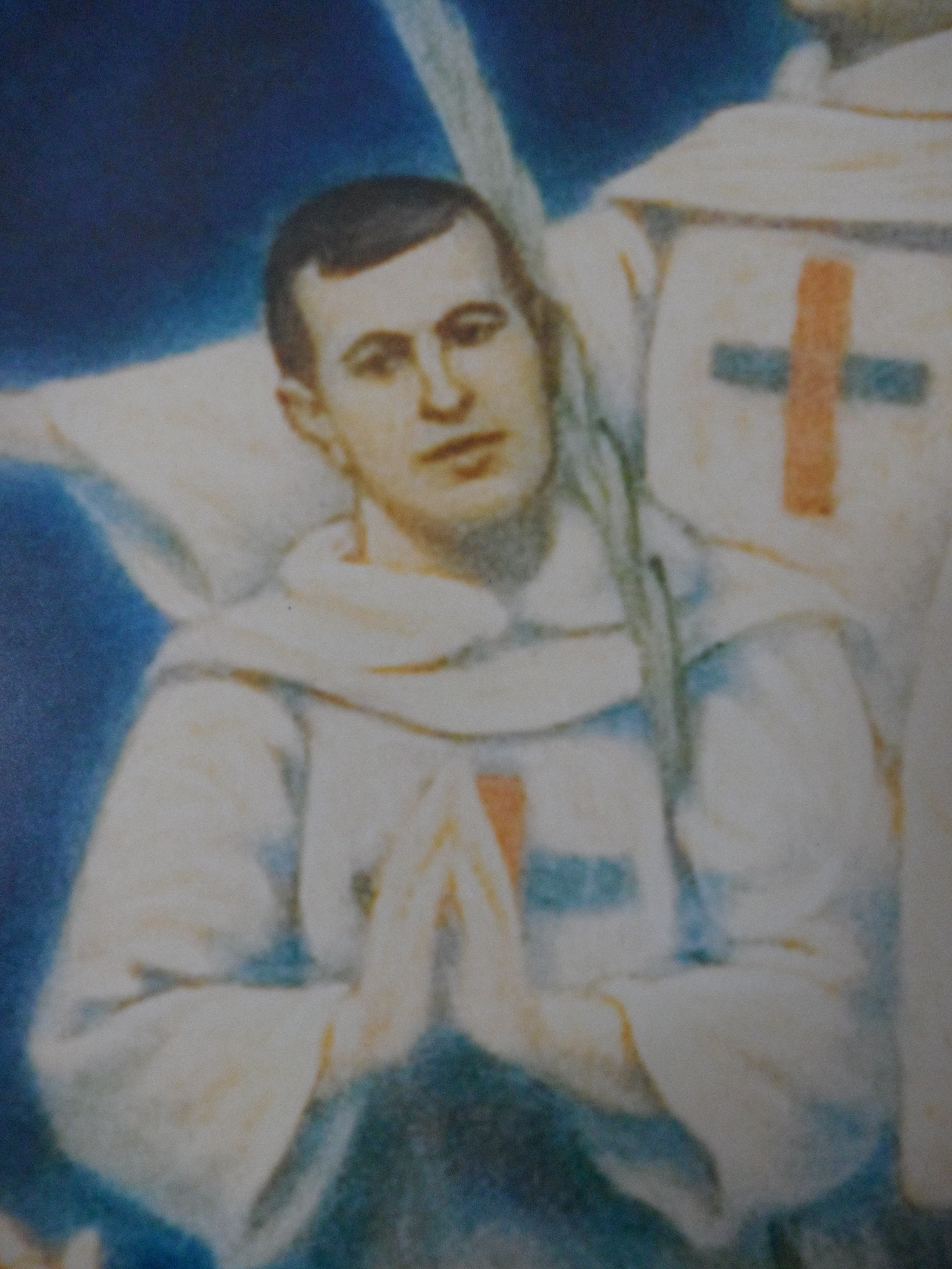 Particular del lienzo con motivo a la beatificación de Mariano de San José y compañeros mártires trinitarios. Convento de San Carlo alle Quattro Fontane.